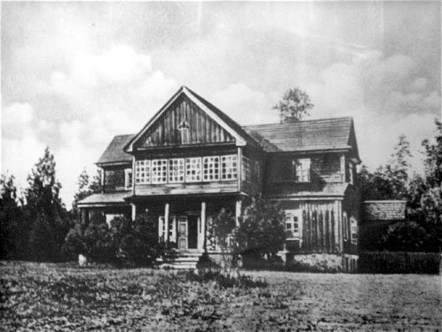 Беларуская (тарашкевіца): Дзяржынава (Dziaržynava), сядзіба Дзяржынскіх (Dziaržynski)